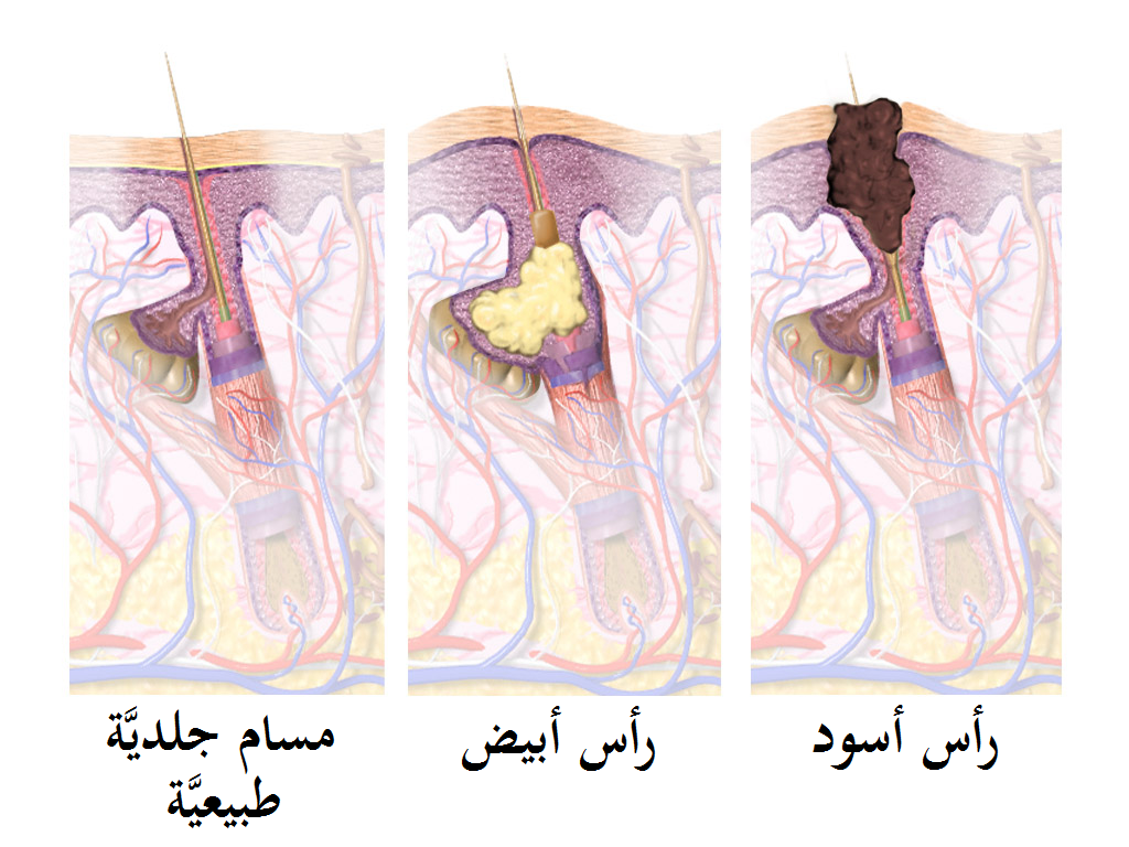 رسمٌ بيانيٌّ يُوضح الفرق بين المسام الجلديَّة الطبيعيَّة عند الإنسان، وتلك التي تُعاني من الزؤان.